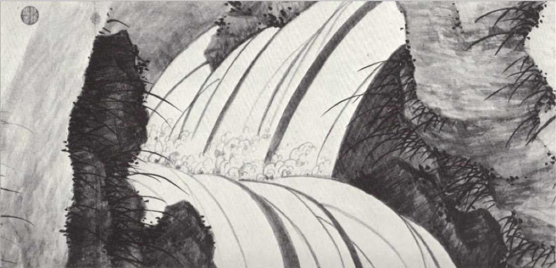 Bambous le long d'une rivière, dans la pluie, au printemps par le peintre chinois Xia Chang en 1441. (Détail 2) d'un rouleau en longueur. C'est une encre sur papier d'une hauteur de 40,9 centimètres, et d'une longueur de 127 centimètres. Cette œuvre se trouve à chicago (Art Institute of Chicago), Kate S. Buckingham Income Fund (inv. 50.2).